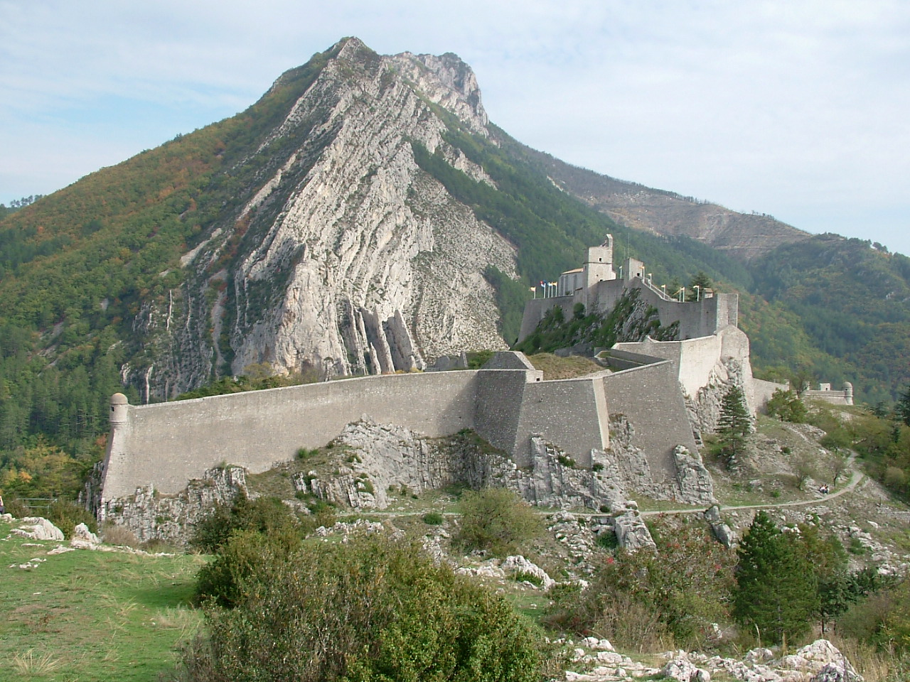 Citadelle de Sisteron - vue de l'ouest